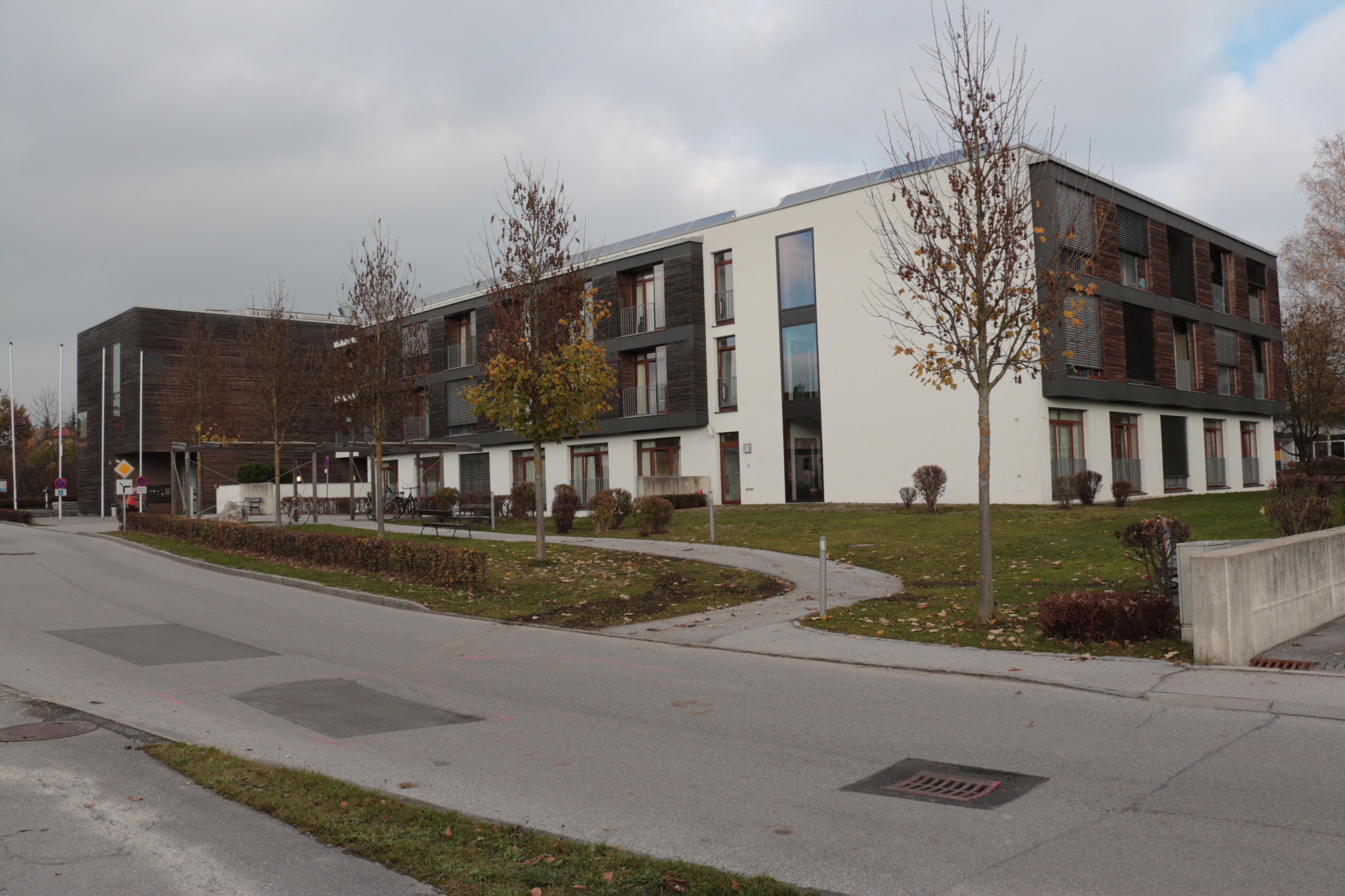 Seniorenwohnhaus Bürmoos, Bezirk Salzburg-Umgebung